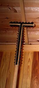 Tsekubo, Edo period, Japan.